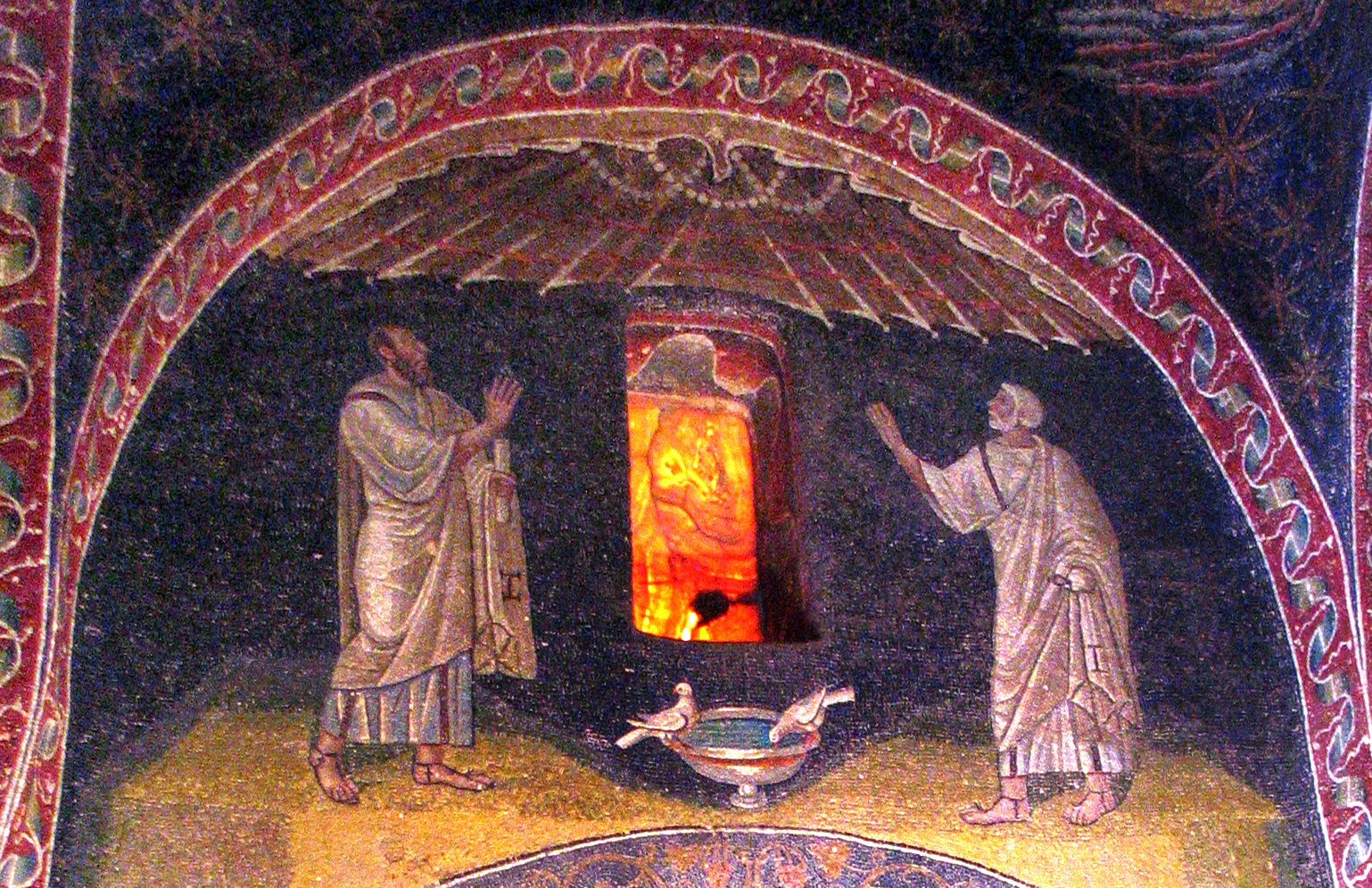 Mausoléu de Galla Placidia, Ravena. Figuras de São Paulo e São Pedro.